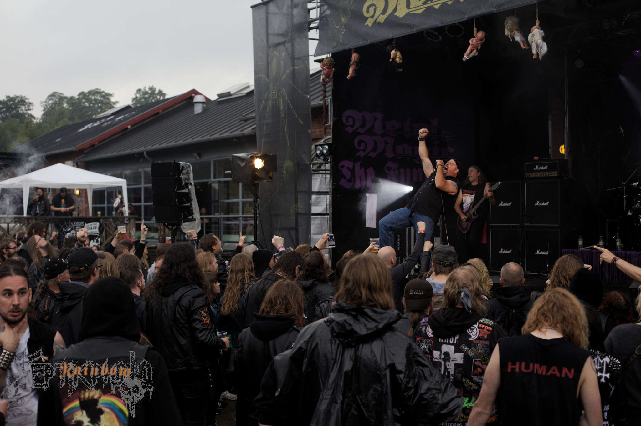 Manilla Road at Metal Magic 2016